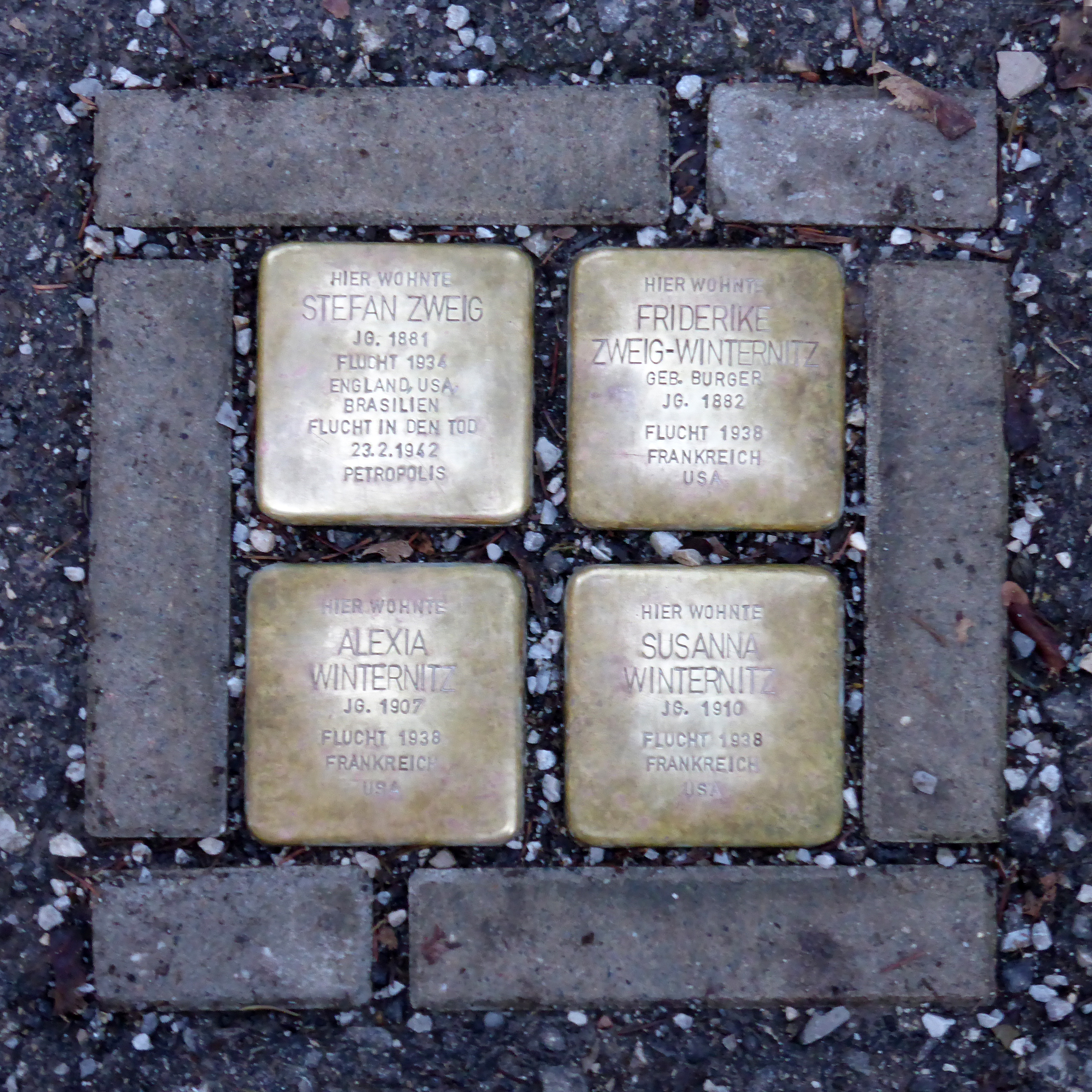 Stolperstein: Verlegestelle Kapuzinerberg 5.